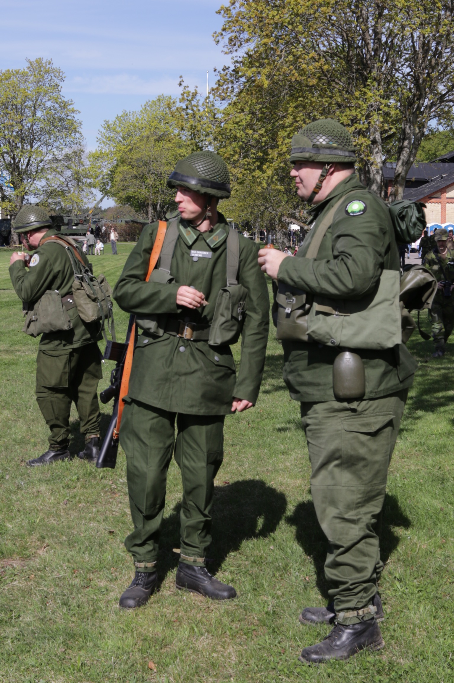 Uniform modell 59